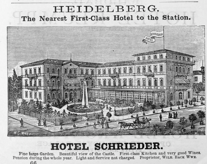 Hotel advertisement